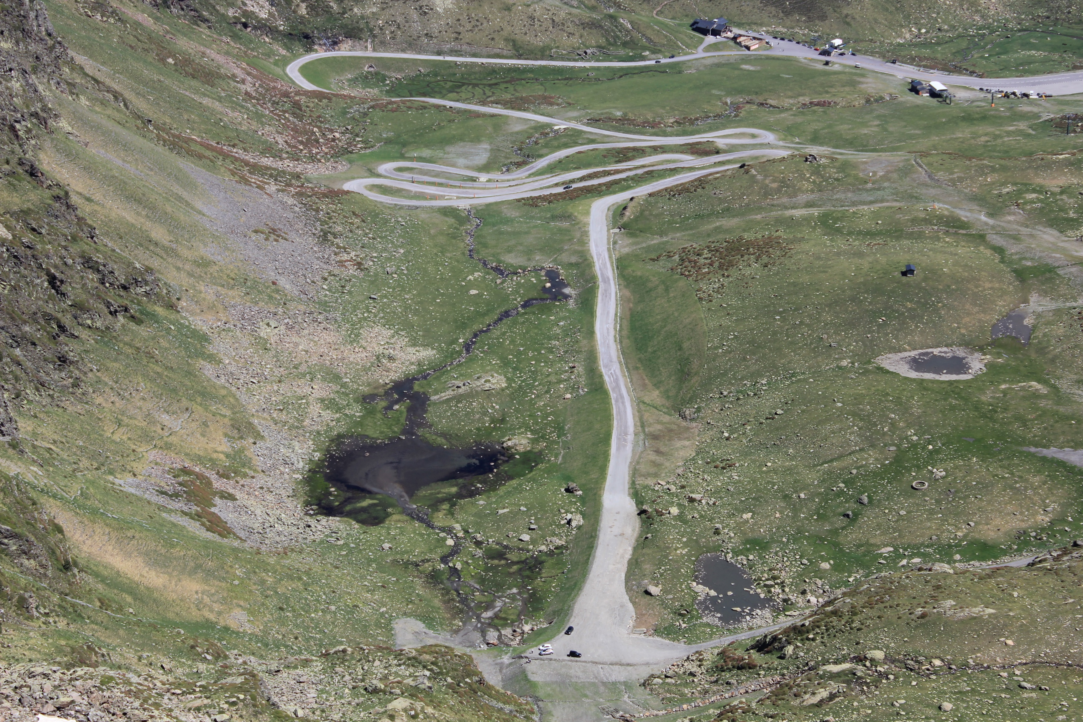 Basses del Port de Rat This is a a photo of a lake or pond in Andorra with id: IEA-BE-6